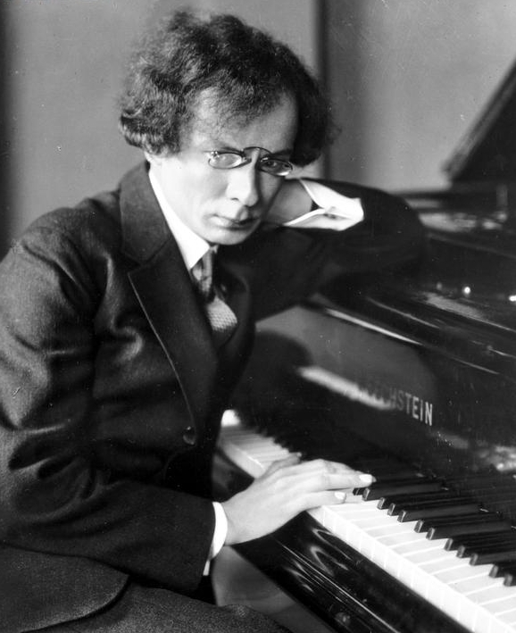 Józef Turczyński